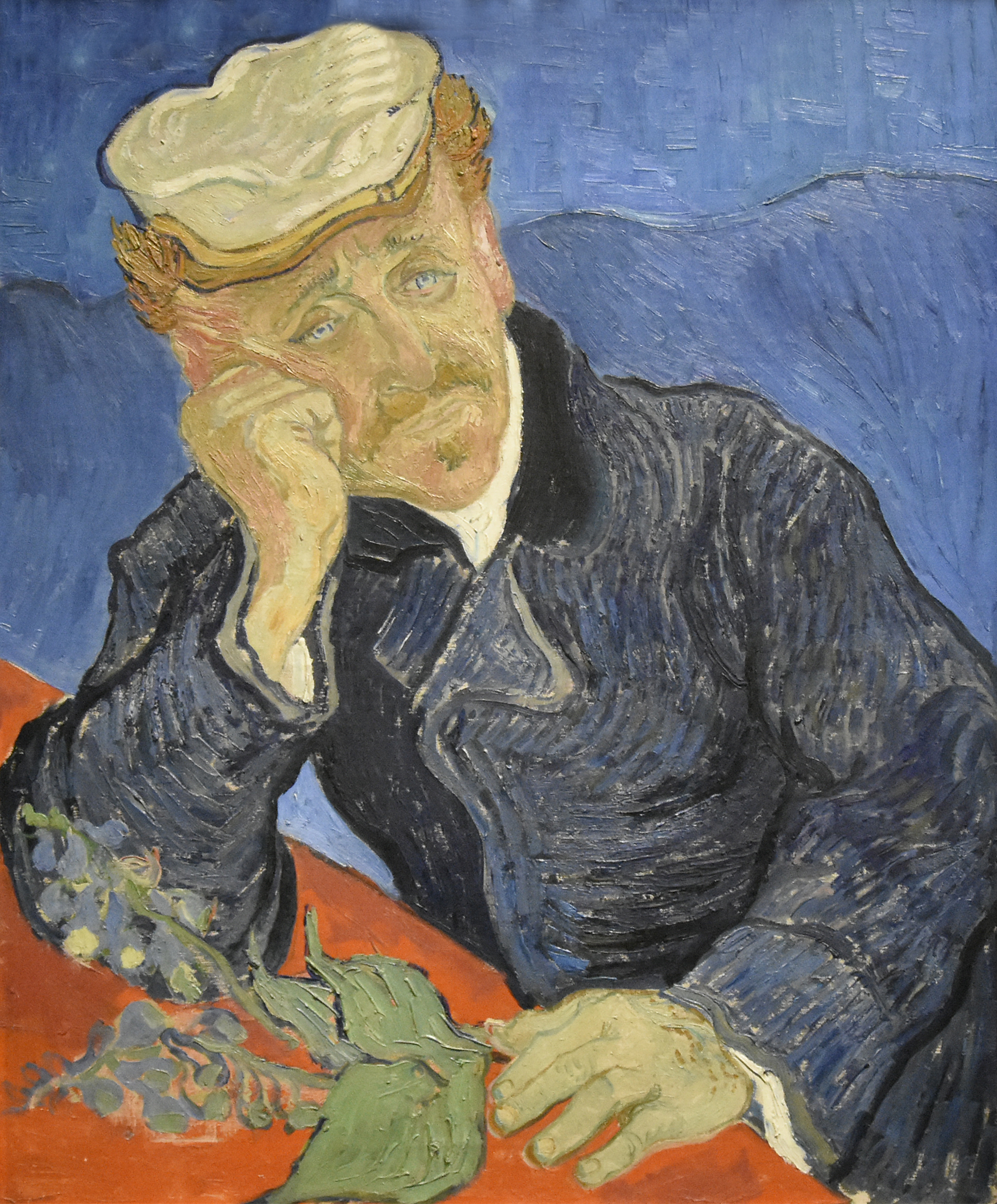 Vincent Van Gogh (1853-1890) Dokter Paul Gachet - Musée d'Orsay Parijs